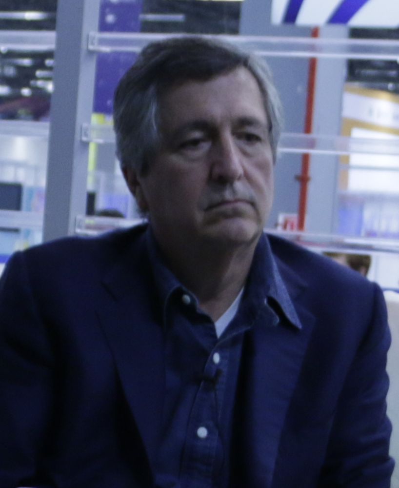 CPMX6